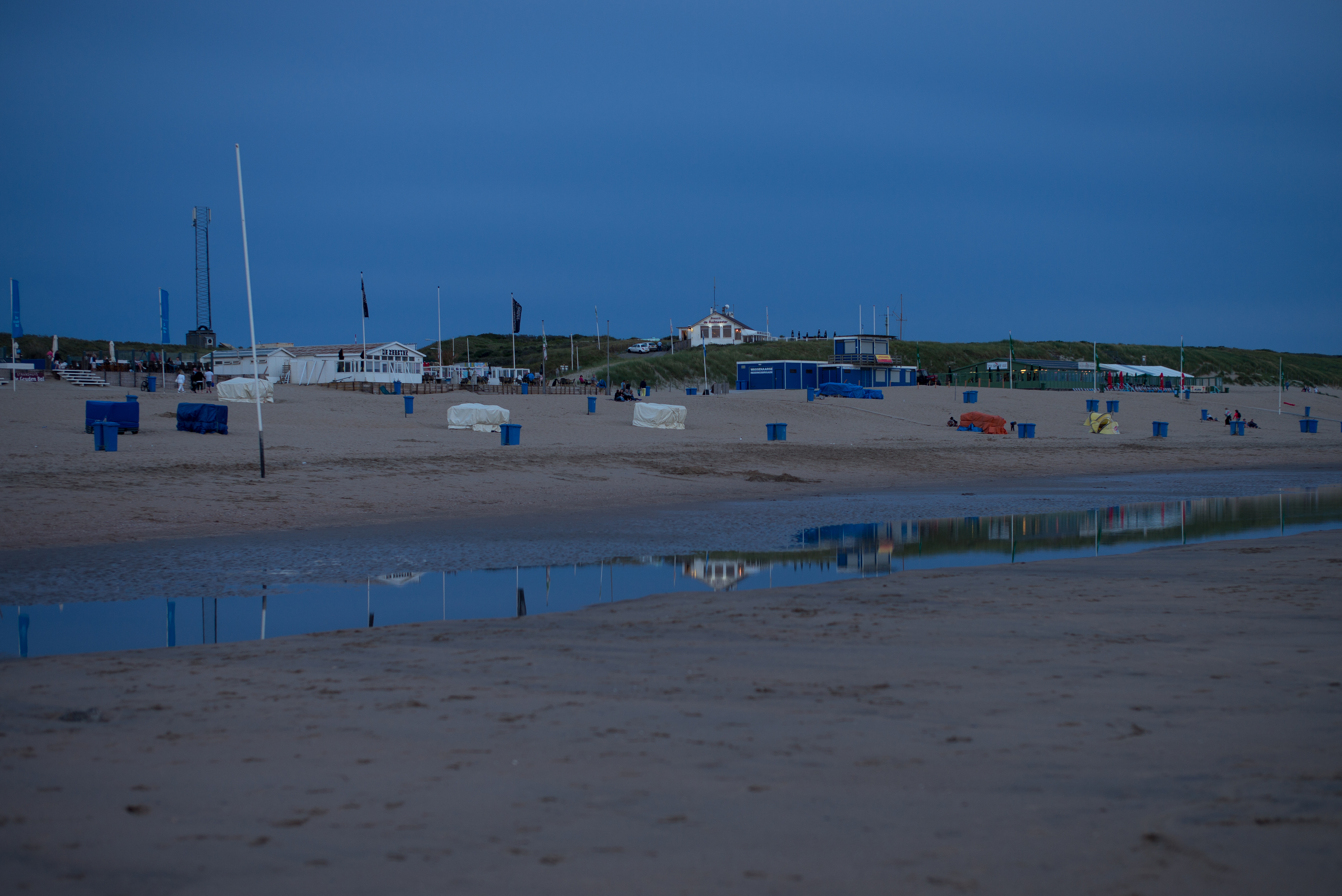 Wassenaar Beach at Night